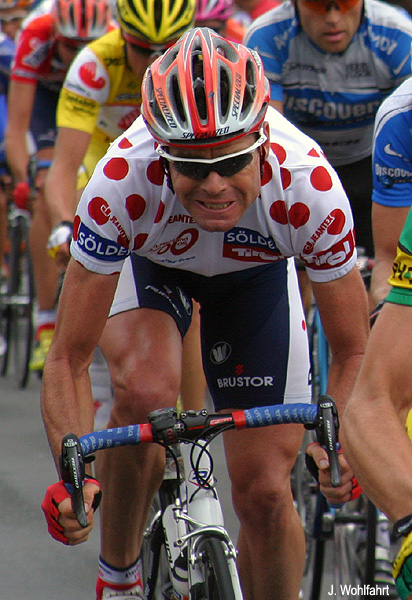 Cadel Evans bei der Deutschlandtour 2005 in Bonn